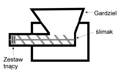 schemat budowy wilka